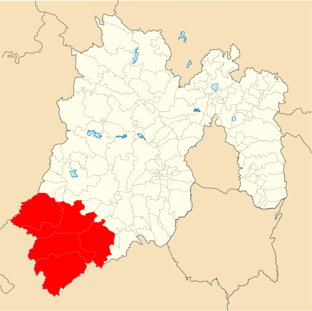 Municipios que integran la región de Tierra Caliente del Estado de Mexico